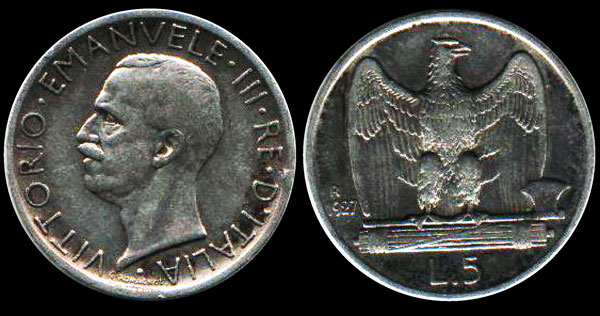 Фото серебрянной монеты 5 итальянских лир 1927 года с портретом короля Виктора-Эмануэля-III